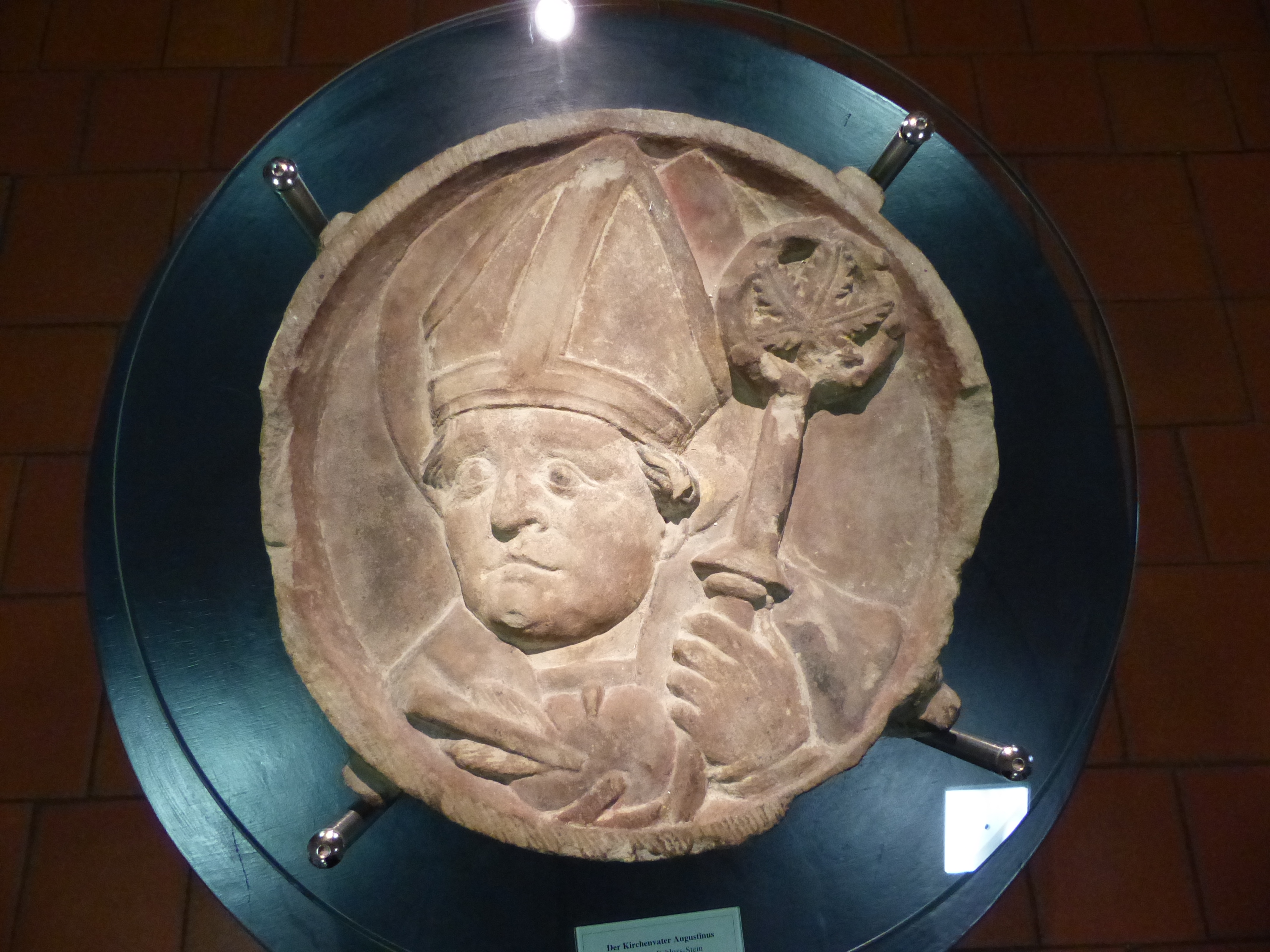 Der Kirchenvater Augustinus, Spätgotischer Schluss-Stein, Augustinerkloster in Erfurt